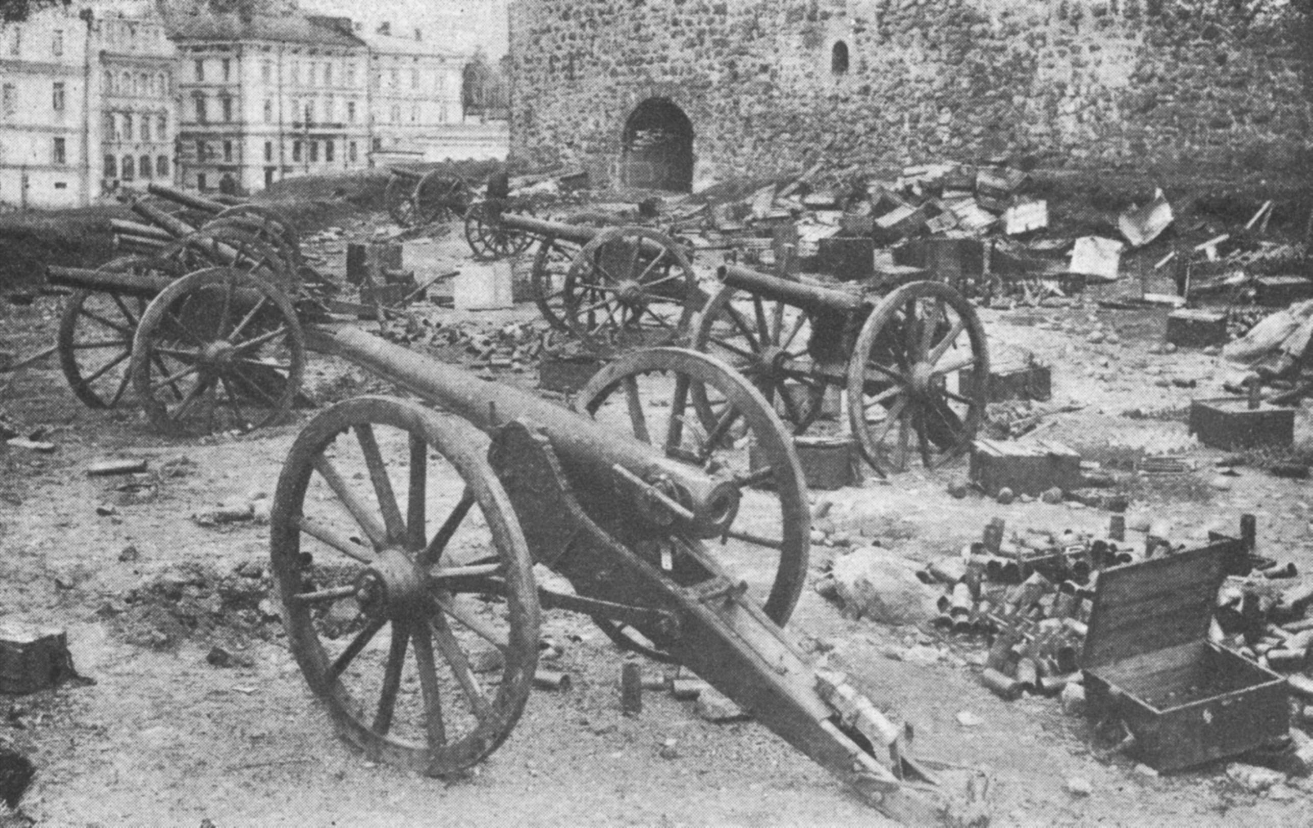 Description